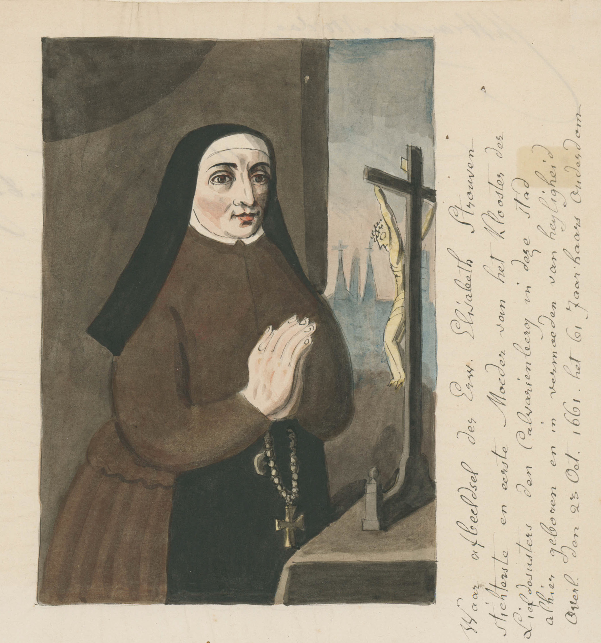 Tekening van Philippe van Gulpen van Elisabeth Strouven, de 17e-eeuwse stichteres van het Calvariënbergklooster in Maastricht. De tekening is waarschijnlijk een kopie van een geschilderd portret. Collectie Van der Noordaa in het RHCL, Maastricht, CVDN 121.